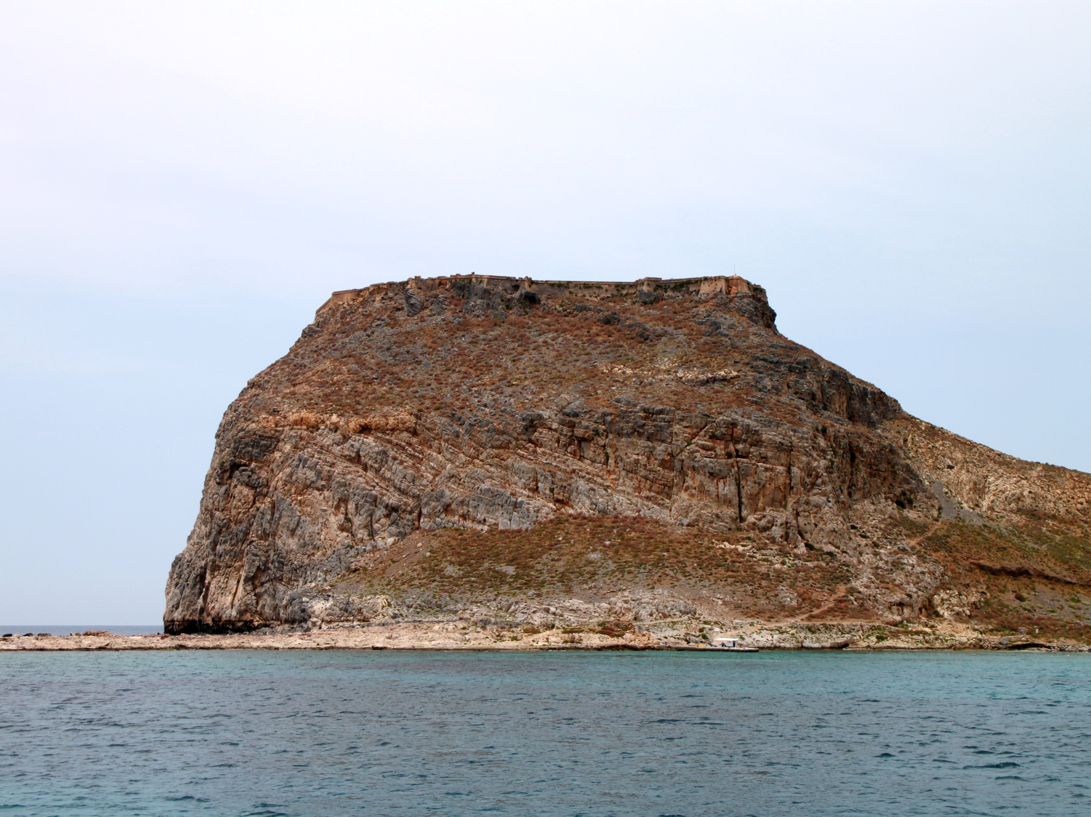 Festungsruine Kastro Gramvousas (Κάστρο Γραμβούσας) auf Imeri Gramvousa (Ήμερη Γραμβούσα), Insel in der Gemeinde Kissamos, Präfektur Chania, Kreta, Griechenland